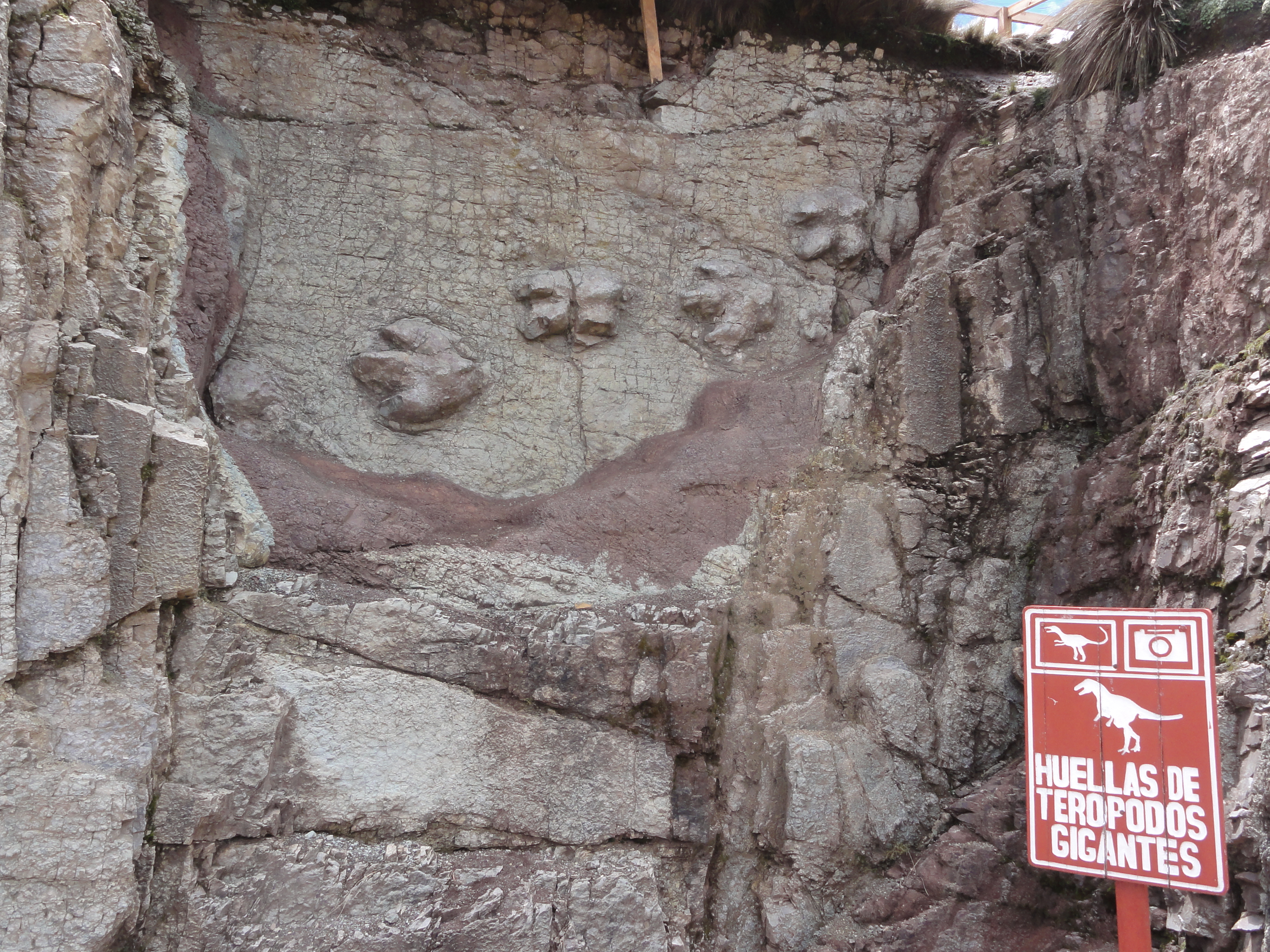 Dinosaur's footprints, road to Antamina, km 80